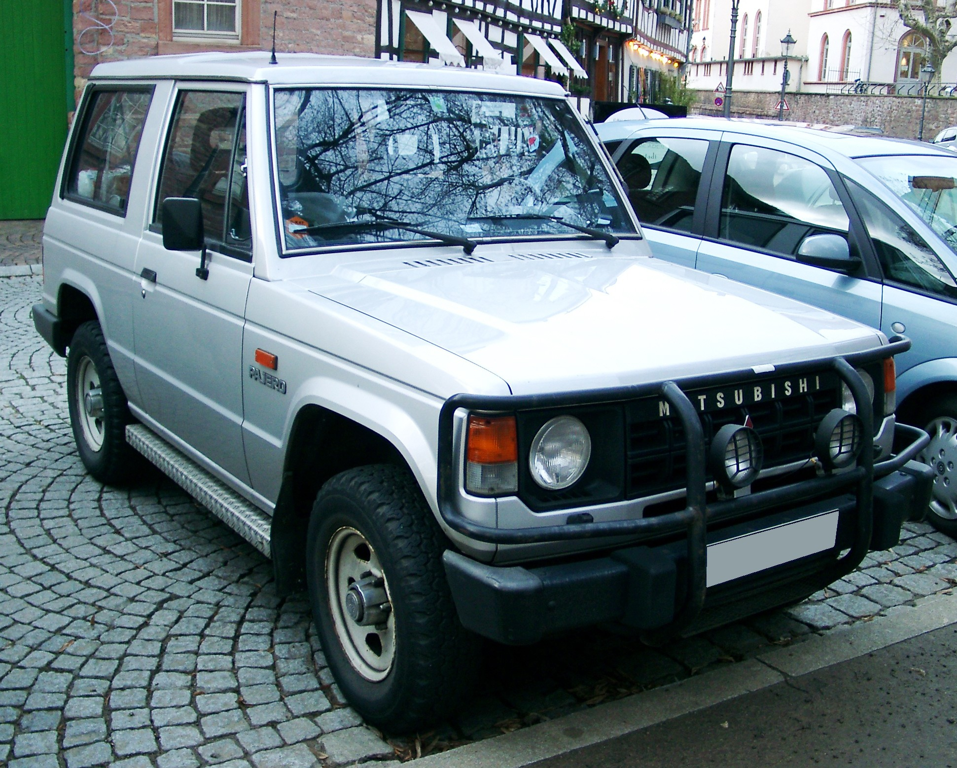 Mitsubishi Pajero